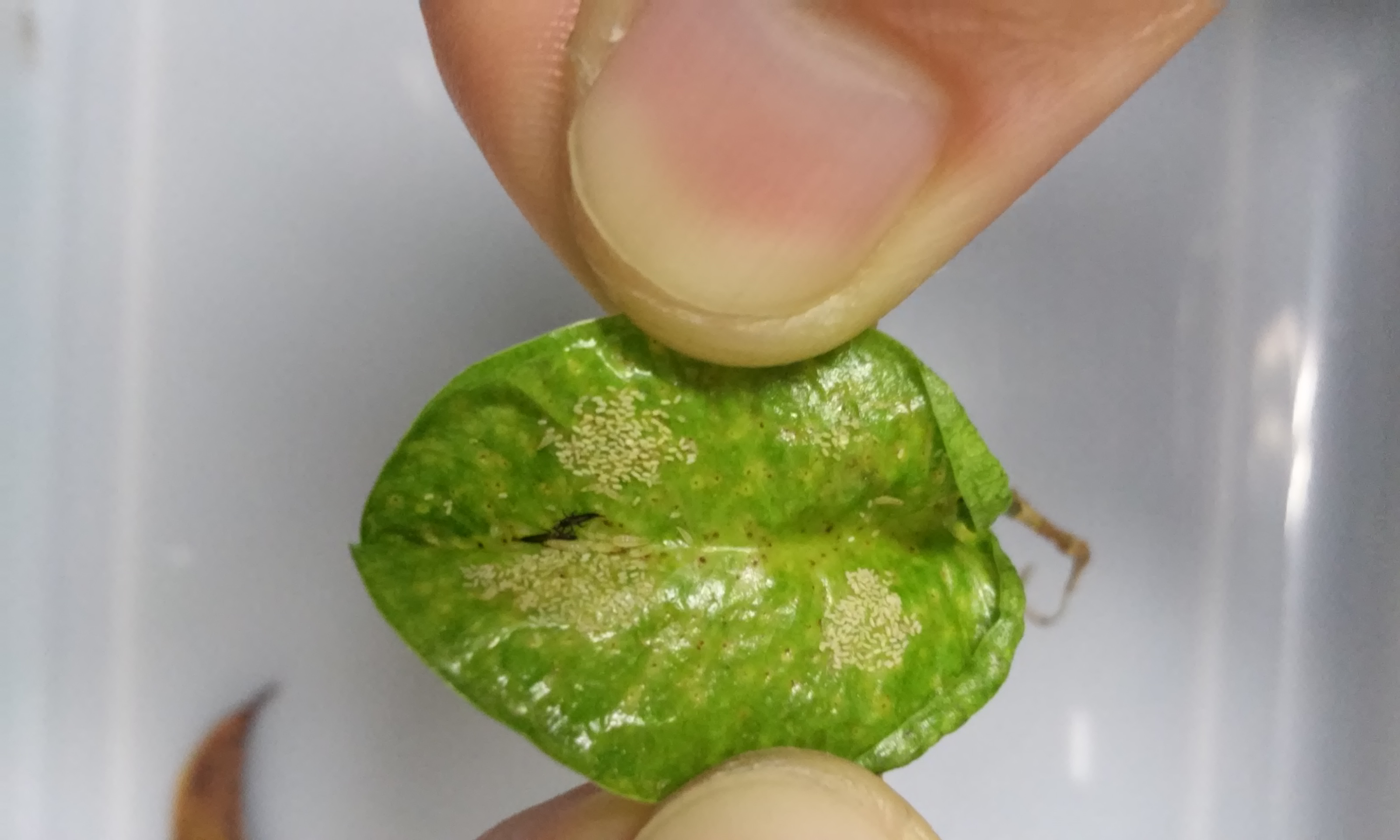 Tripes (da subordem Tubulifera) em diferentes estágios em folha de Ficus.